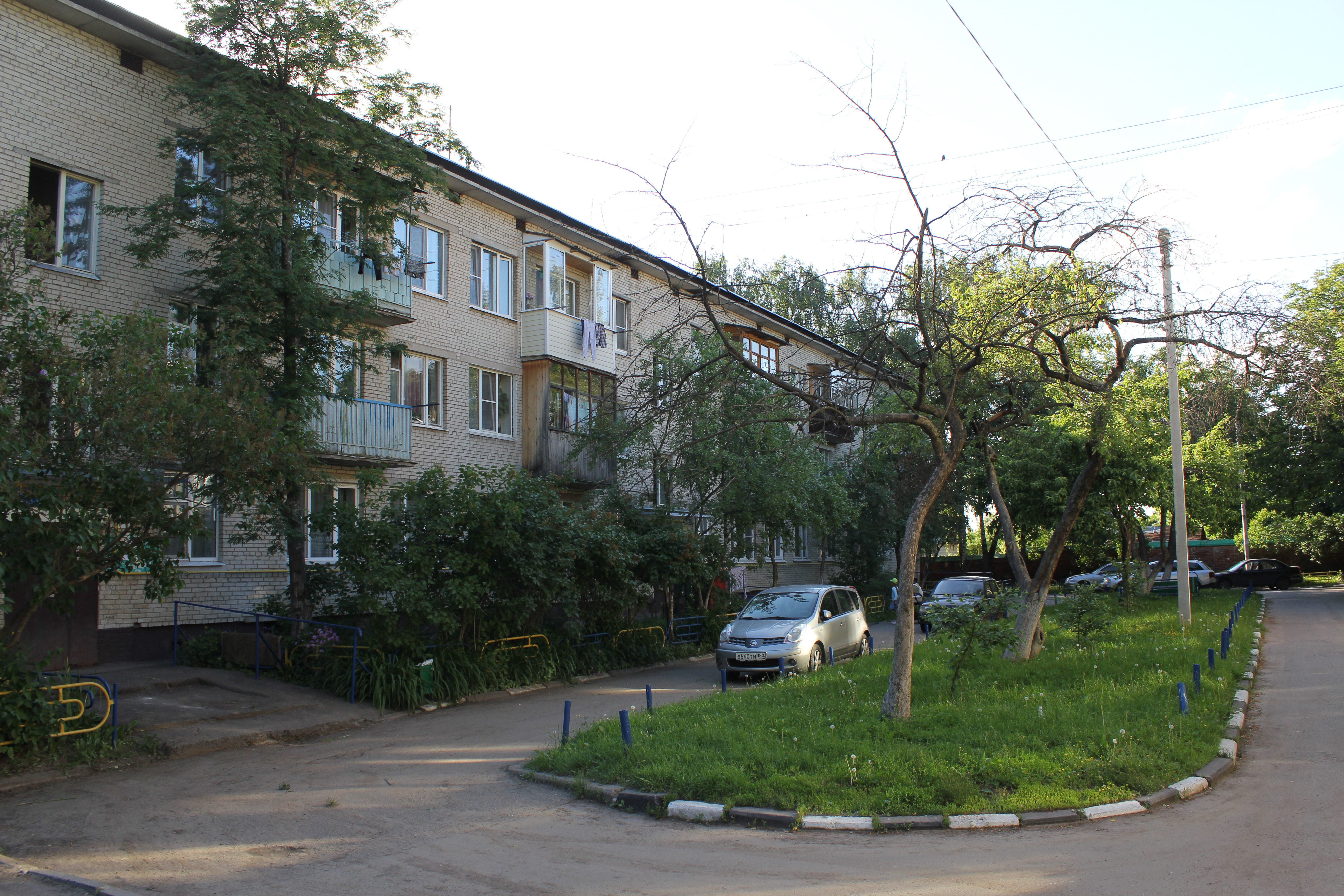 Многоквартирный дом в Валуево